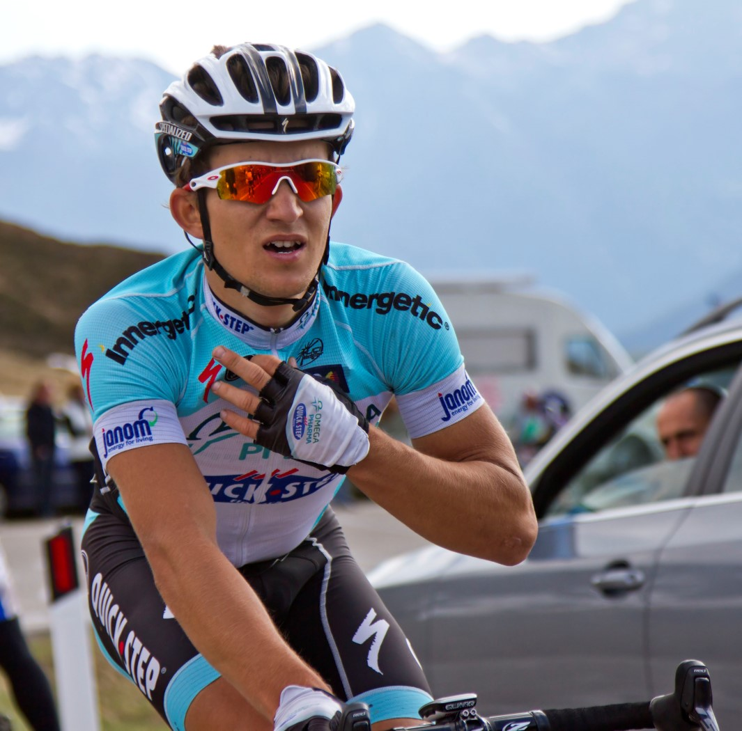 giau 254 kviatkovsky